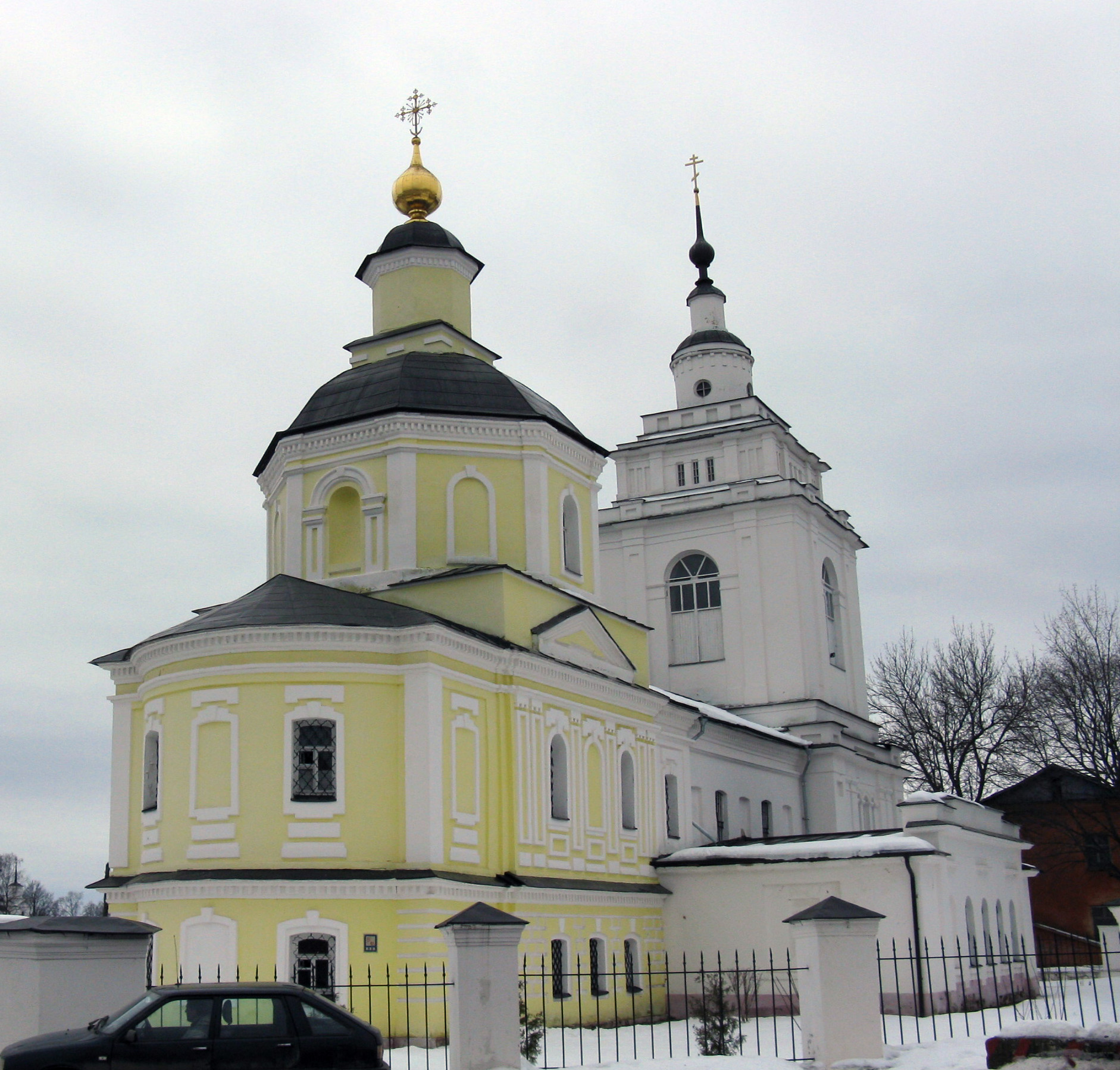 Церковь Покрова Пресвятой Богородицы в Рузе (Московская область)